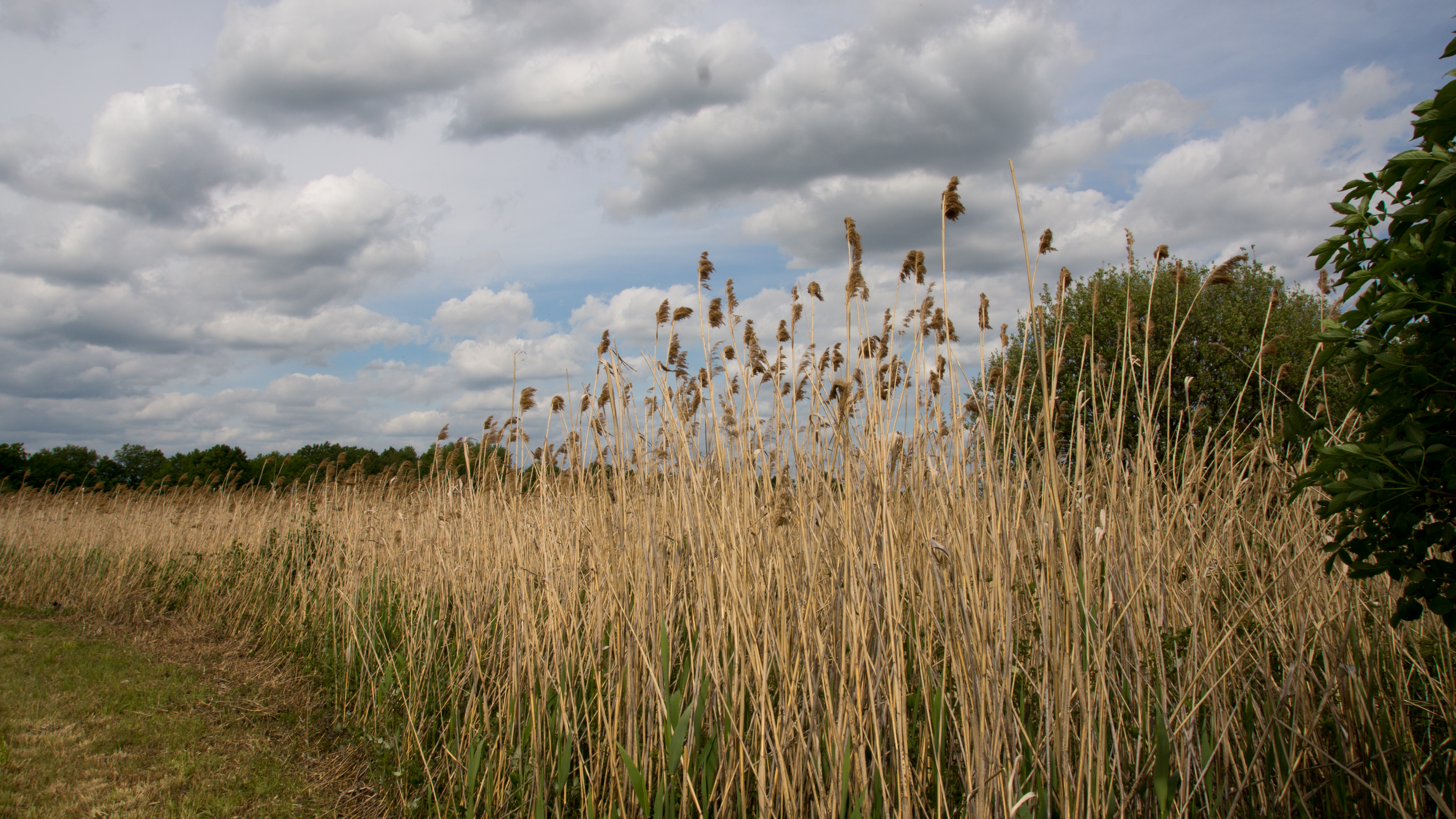 Dippelsdorfer Teich